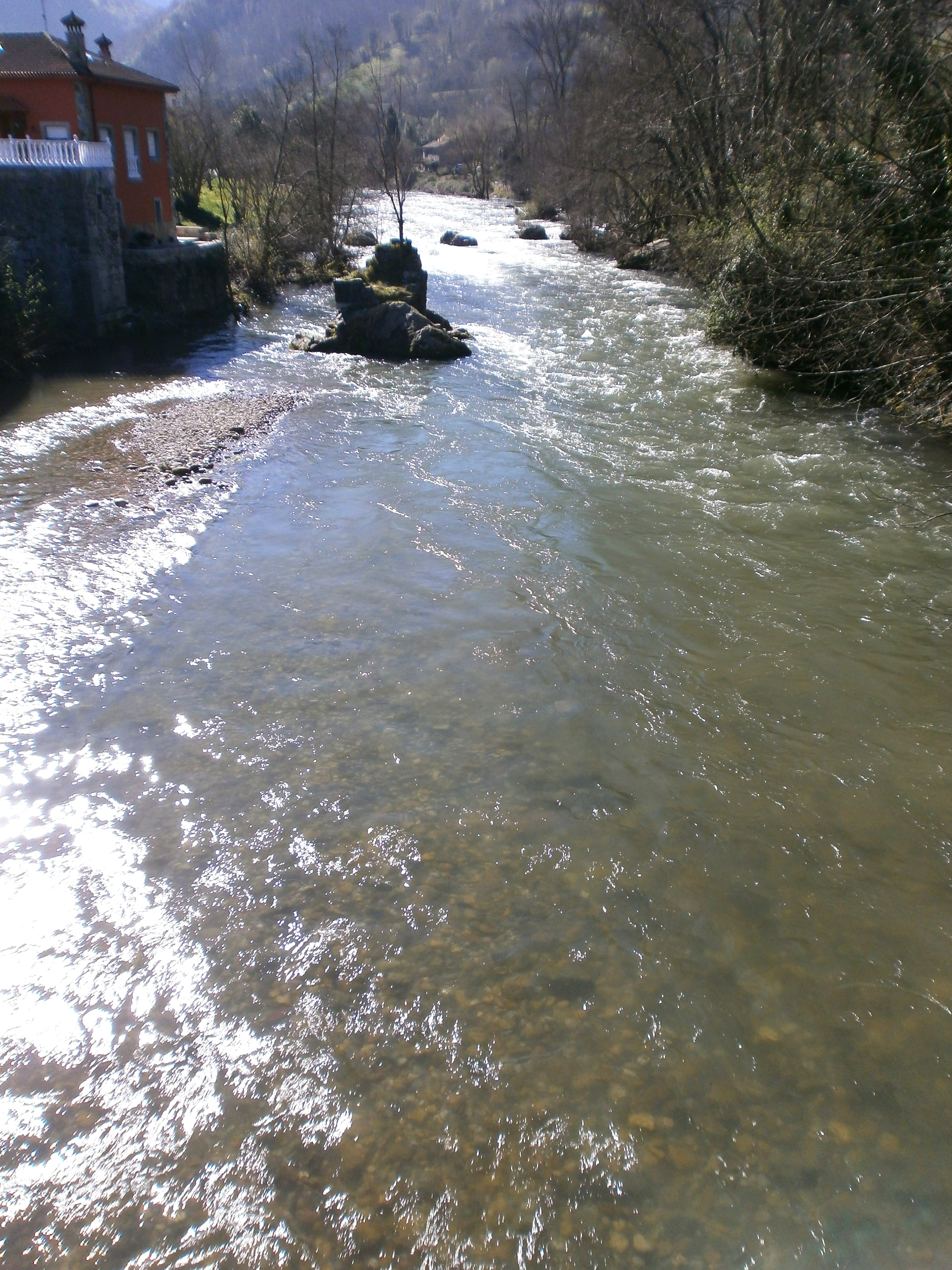 A su paso por el puente de San Andrés: aguas arriba